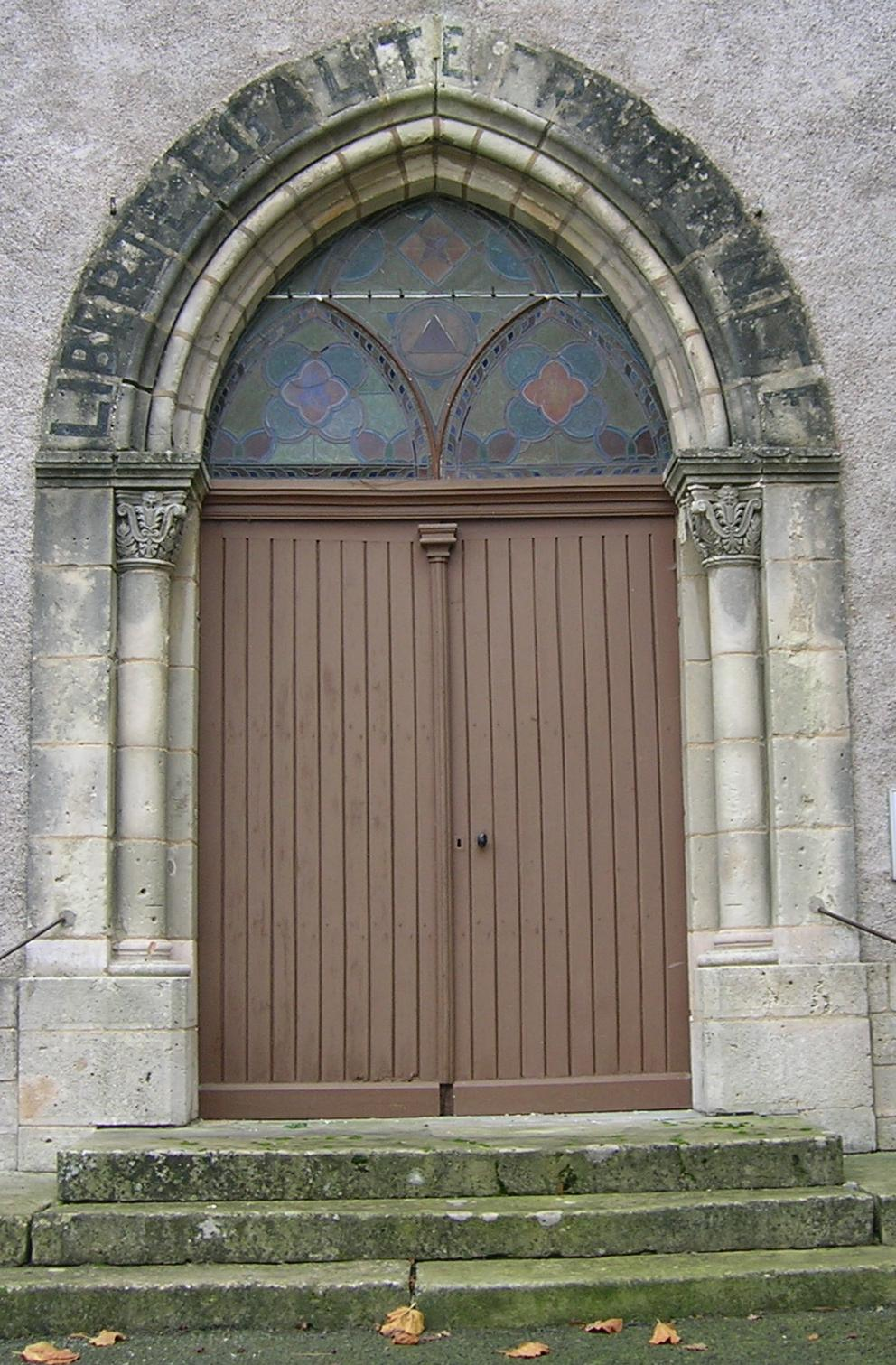 Fronton de l'église de Pernay (37230) on peut y lire la devise de la France : "Liberté Egalité fraternité"